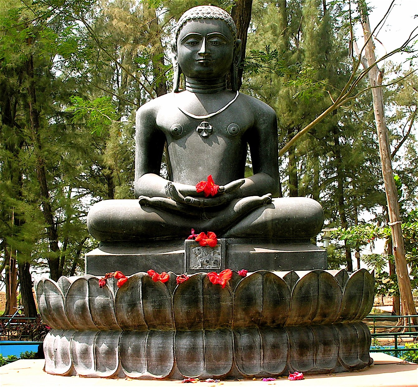 Mahaveer Panaji statue of Mahavira 24th Tirthankara Campi gardens